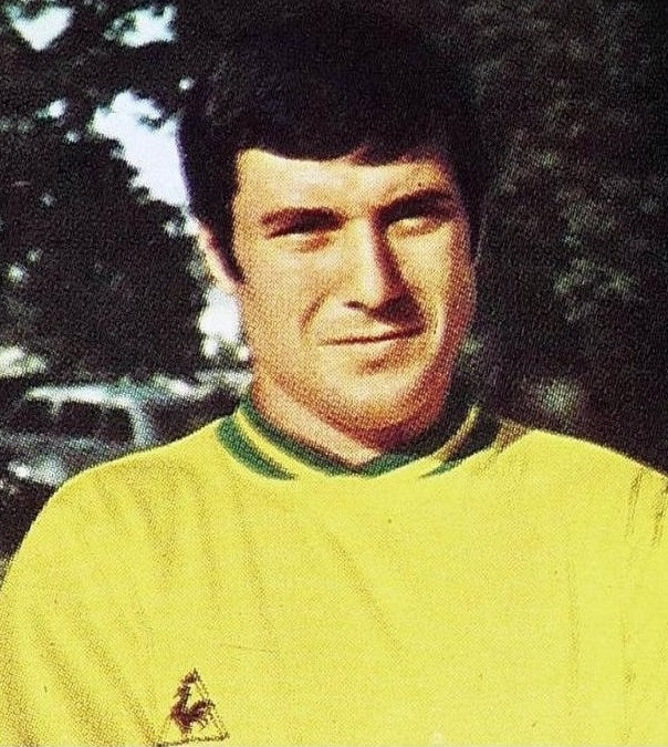 Roger Lemerre en 1970 (FC Nantes), 'Ageducatifs 1970 - 1971', Panini figurina n°144.